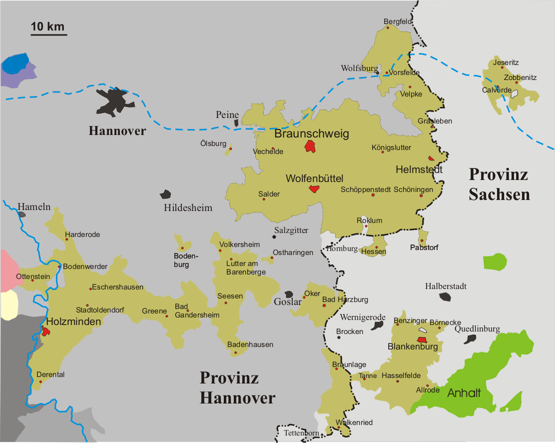 Herzogtum Braunschweig